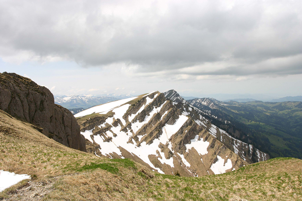 Die Nagelfluhkette - Blick vom Rindalphorn Richtung Hochhädrich